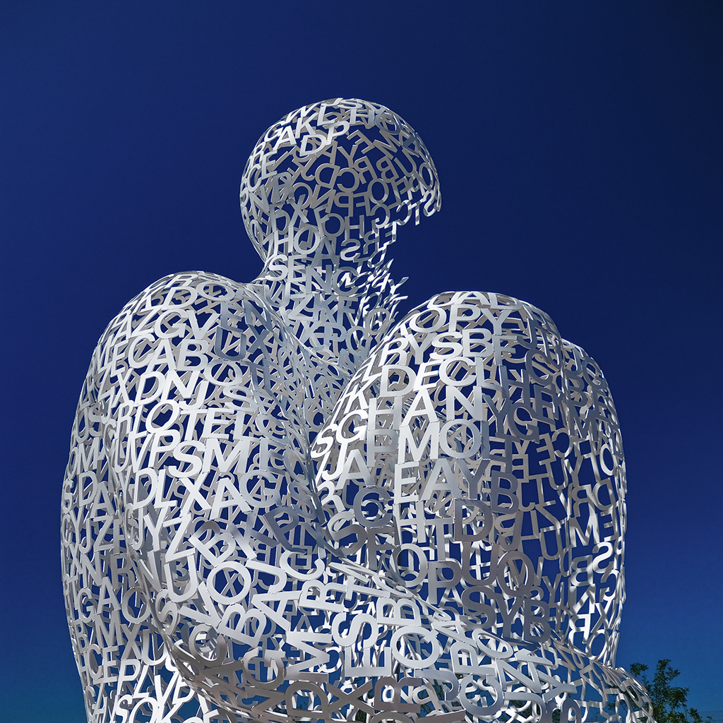 "El Alma del Ebro" sculpture by Artist Jaume Plensa @ Expo Zaragoza. ( Spain, 2008 )